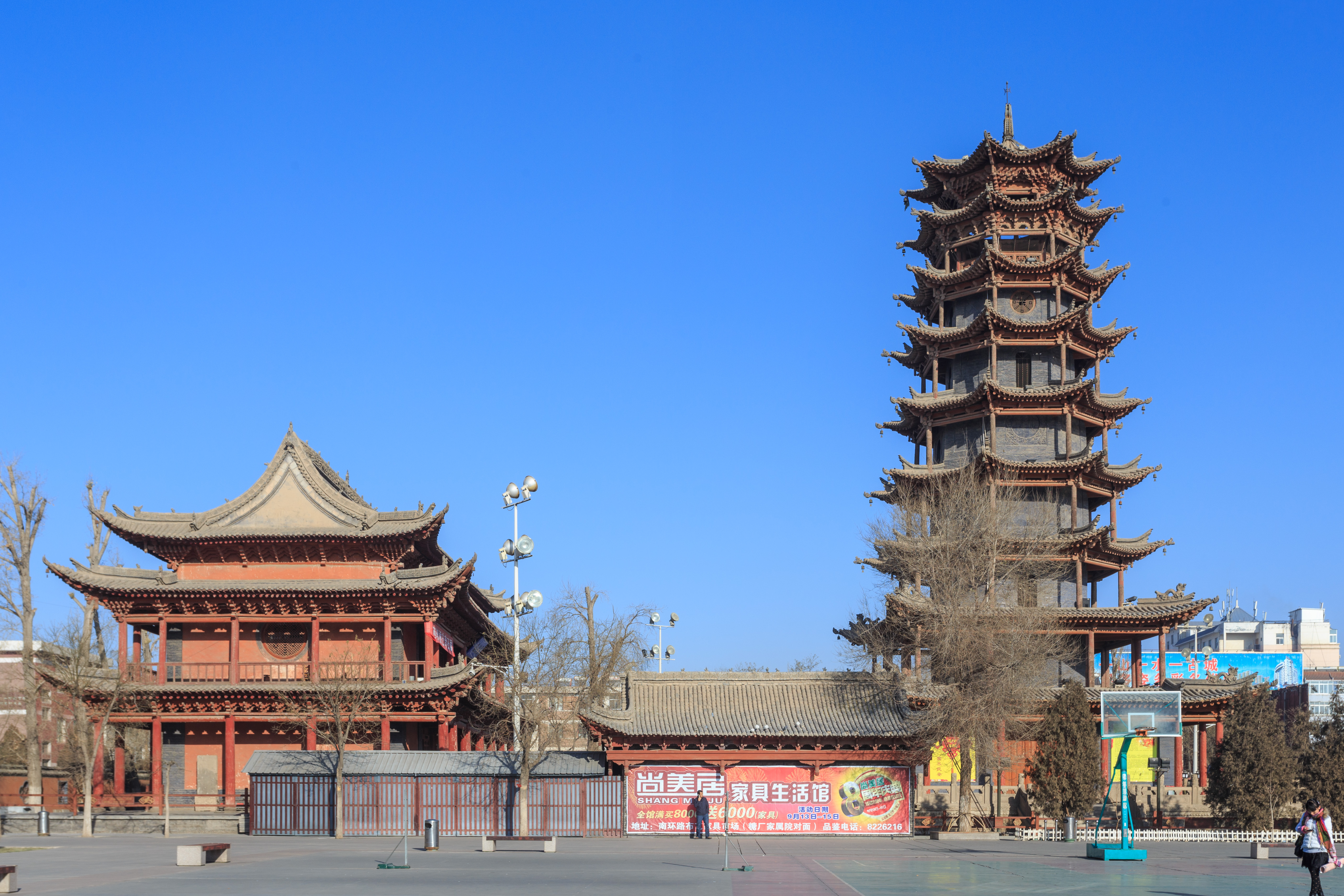 张掖万寿寺（木塔寺）